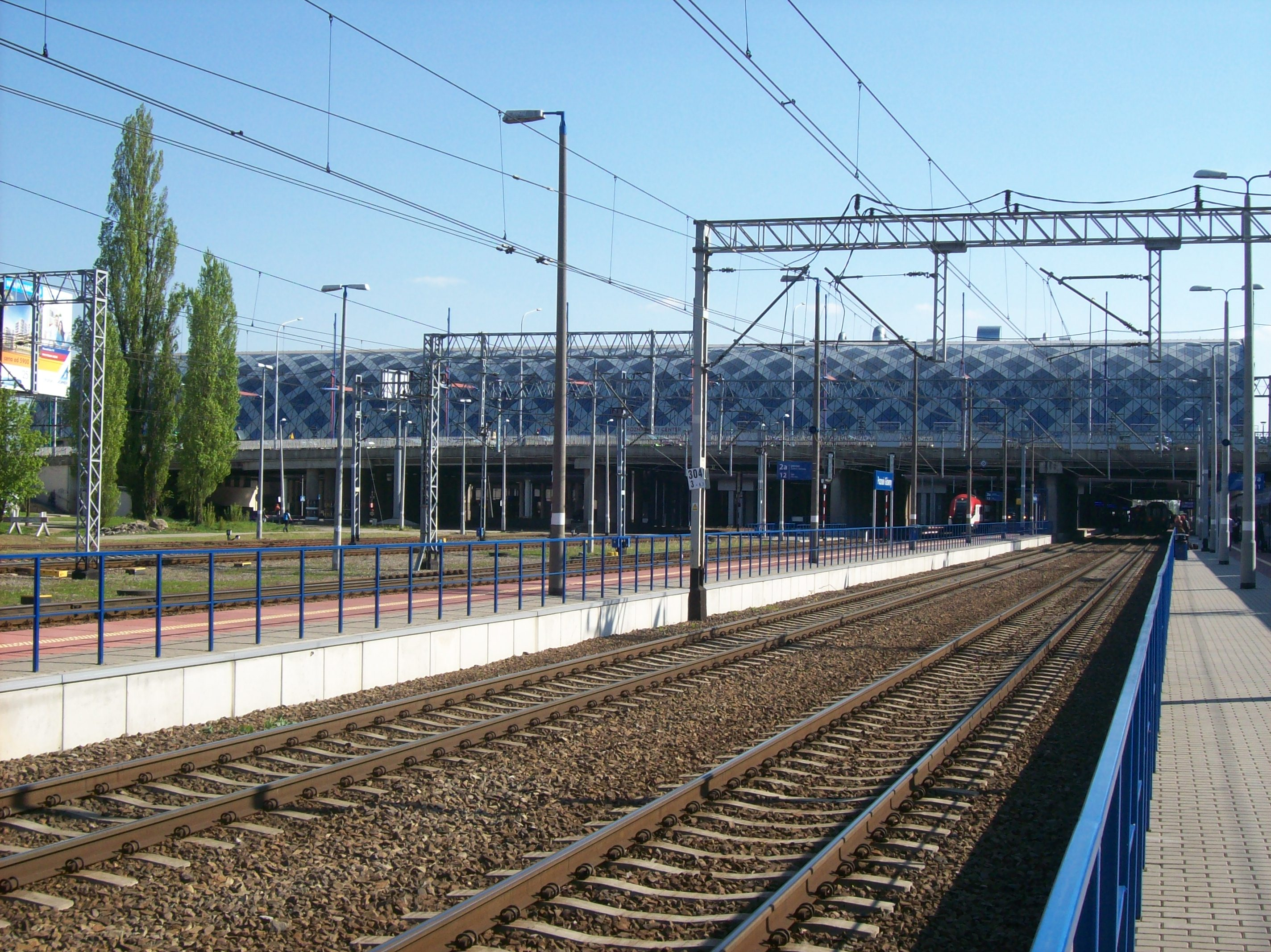 Ogólny widok na stację Poznań Główny